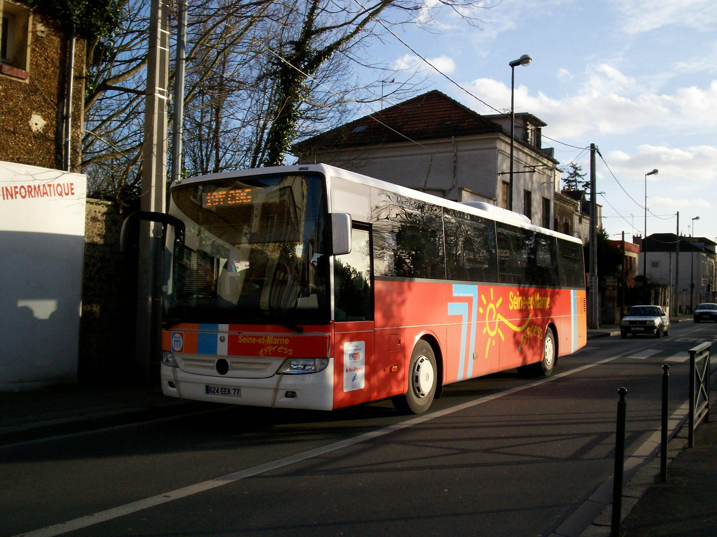 Car Seine et Marne Express ligne 19 en direction de Roissy à Chelles